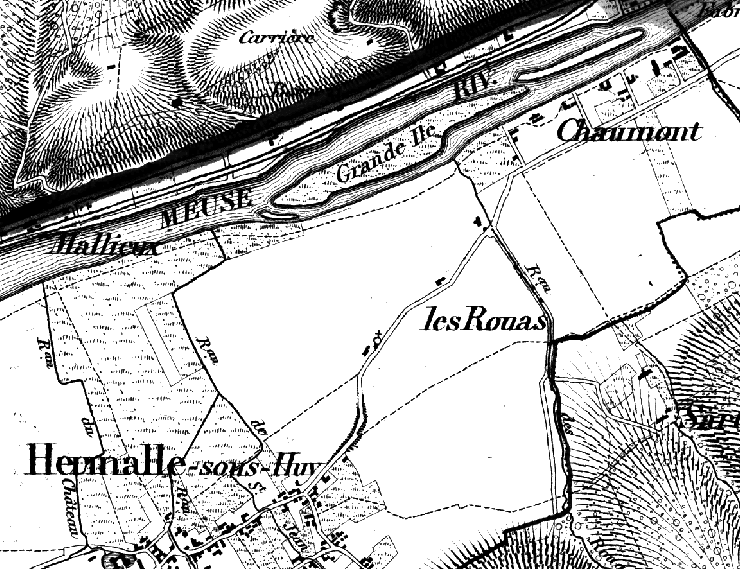 Extrait de la carte de Philippe Vandermaelen, 1850